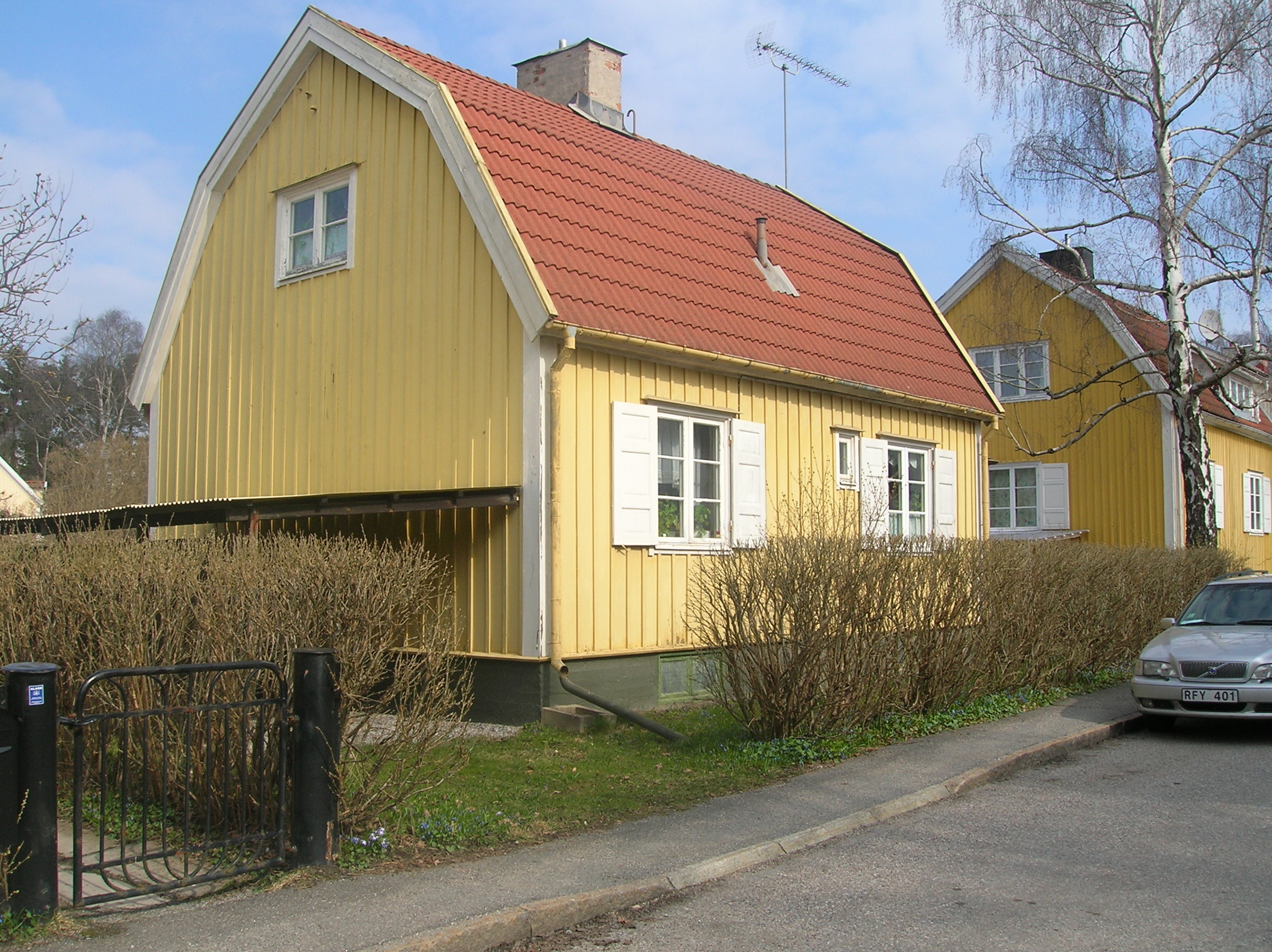 Dammtrappsgatan 20, Enskede gård. Architect Sven Wallander. Built 1925